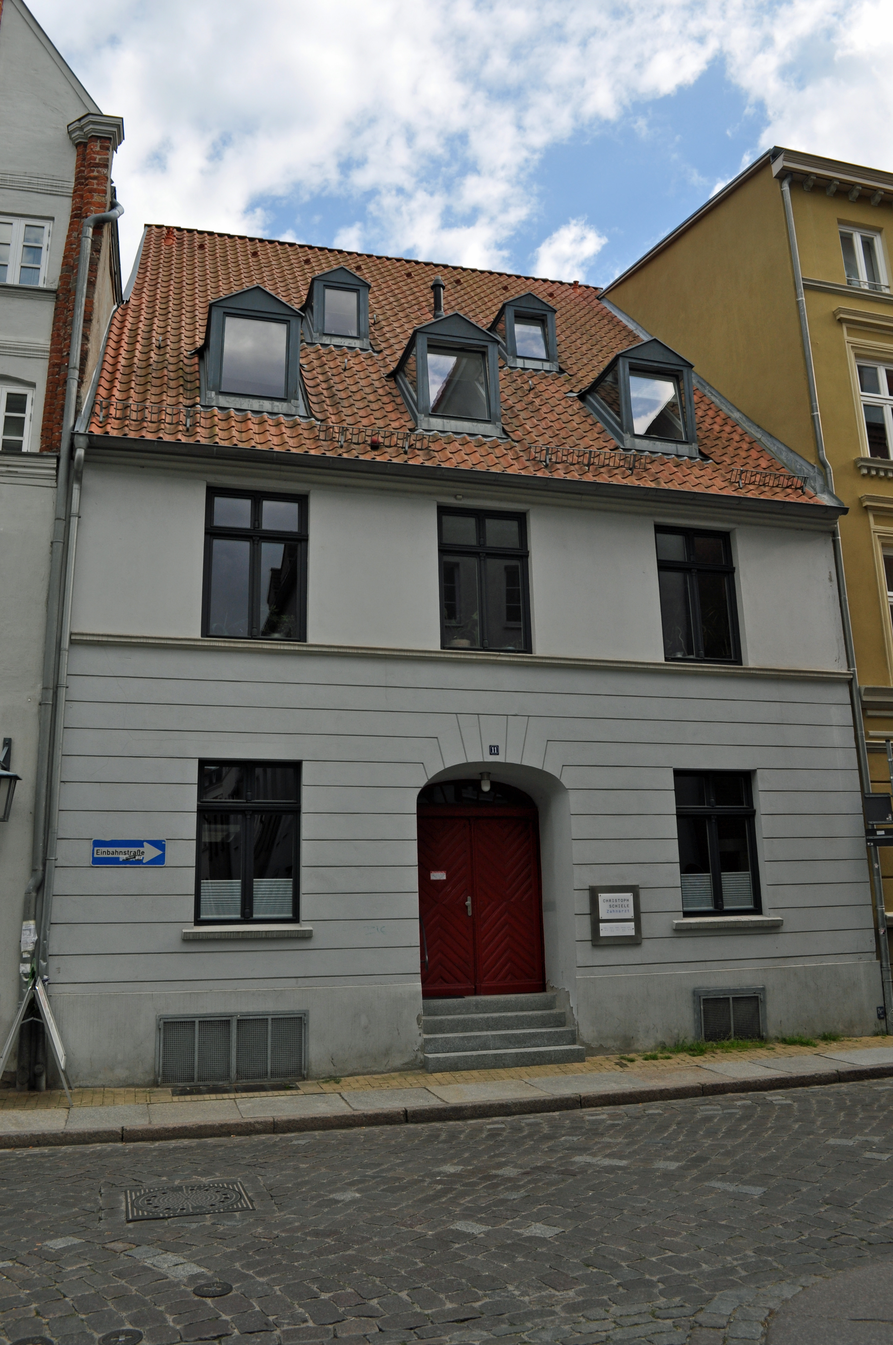 Das Foto zeigt ein Haus (bzw. Details des Hauses) in der Frankenstraße in Stralsund, Deutschland. Die Hausnummer steht im Dateinamen. Aufgenommen am 19. Juli 2011 vom Benutzer:Klugschnacker.